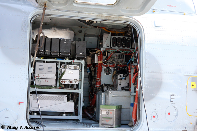 Ka-29